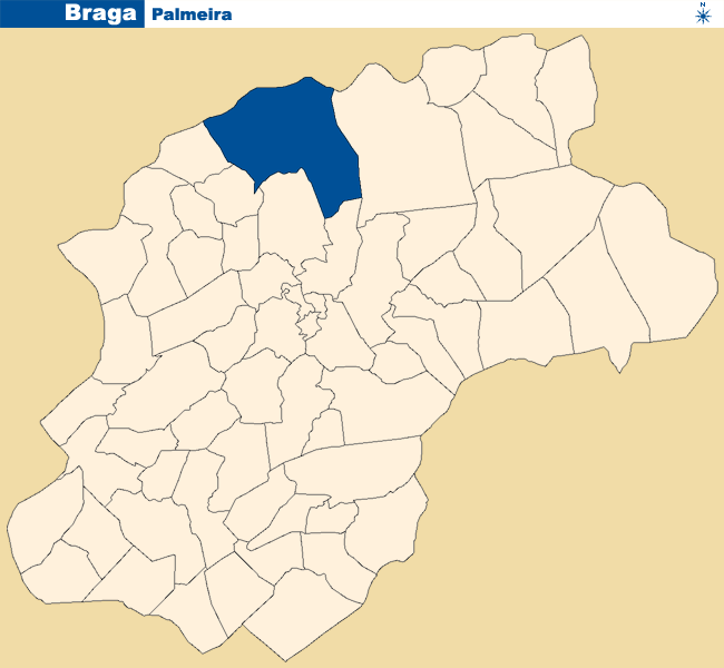 Localização de Palmeira no concelho de Braga.